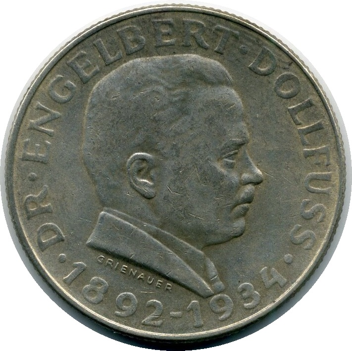 Bildseite der 2-Schilling-Gedenkmünze aus dem Jahr 1934